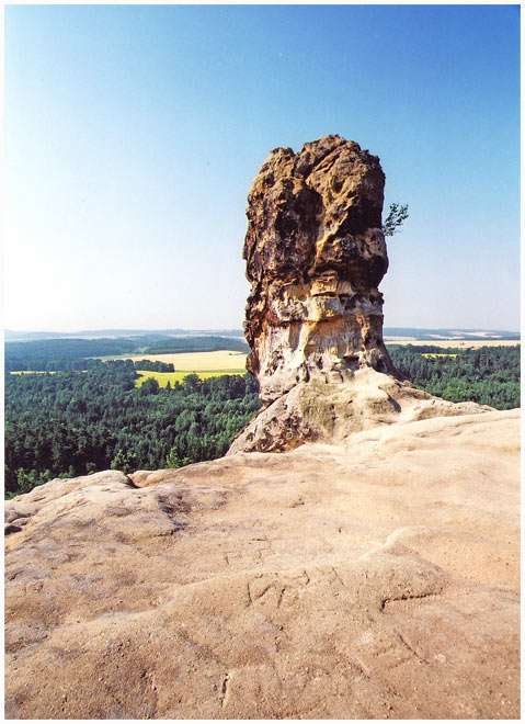 Čapská palice